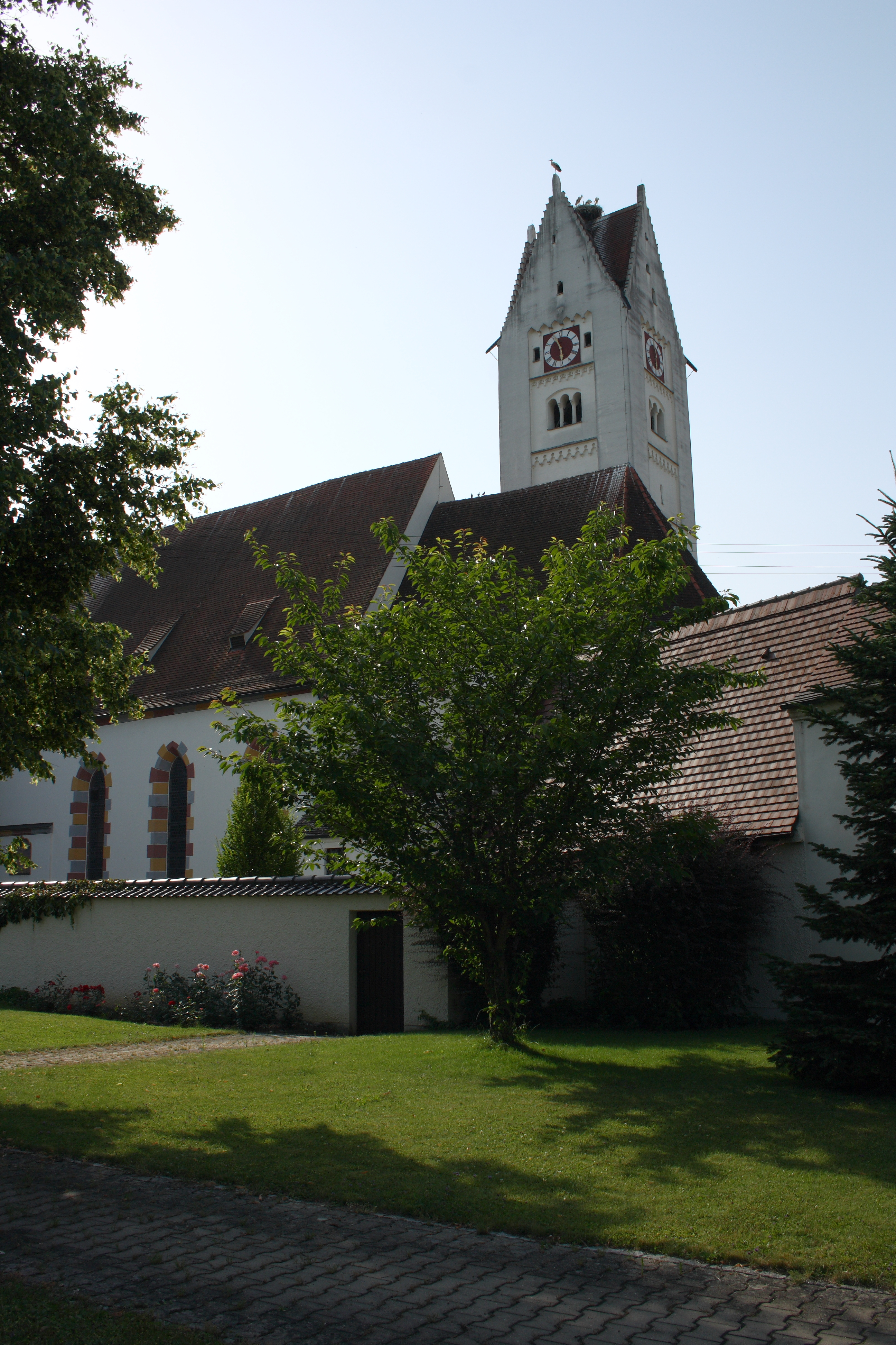 Katholische Pfarrkirche St. Martin in Unterknöringen, einem einem Stadtteil von Burgau im Landkreis Günzburg (Bayern)